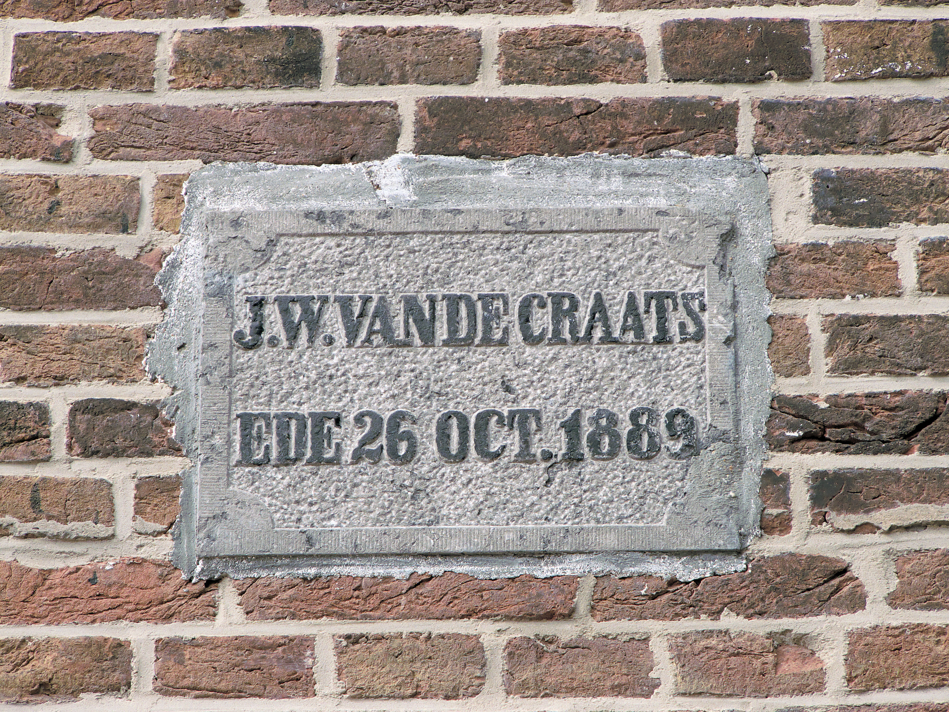 Gevelsteen van de Concordia molen te Ede. In dat jaar is het ketelhuis met de stoommachine geplaatst.